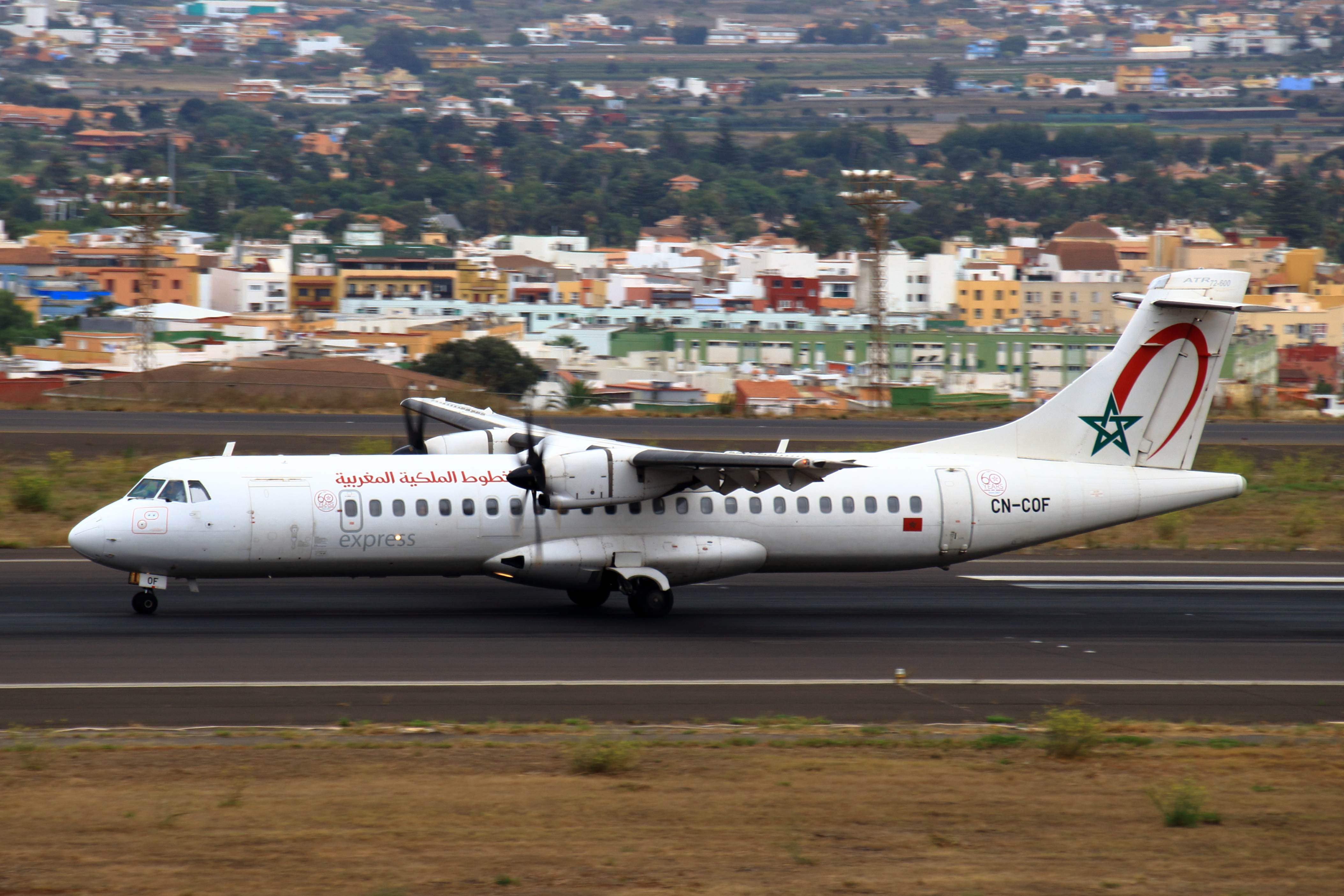 CN-COF / Royal Air Maroc Express / ATR 72-600